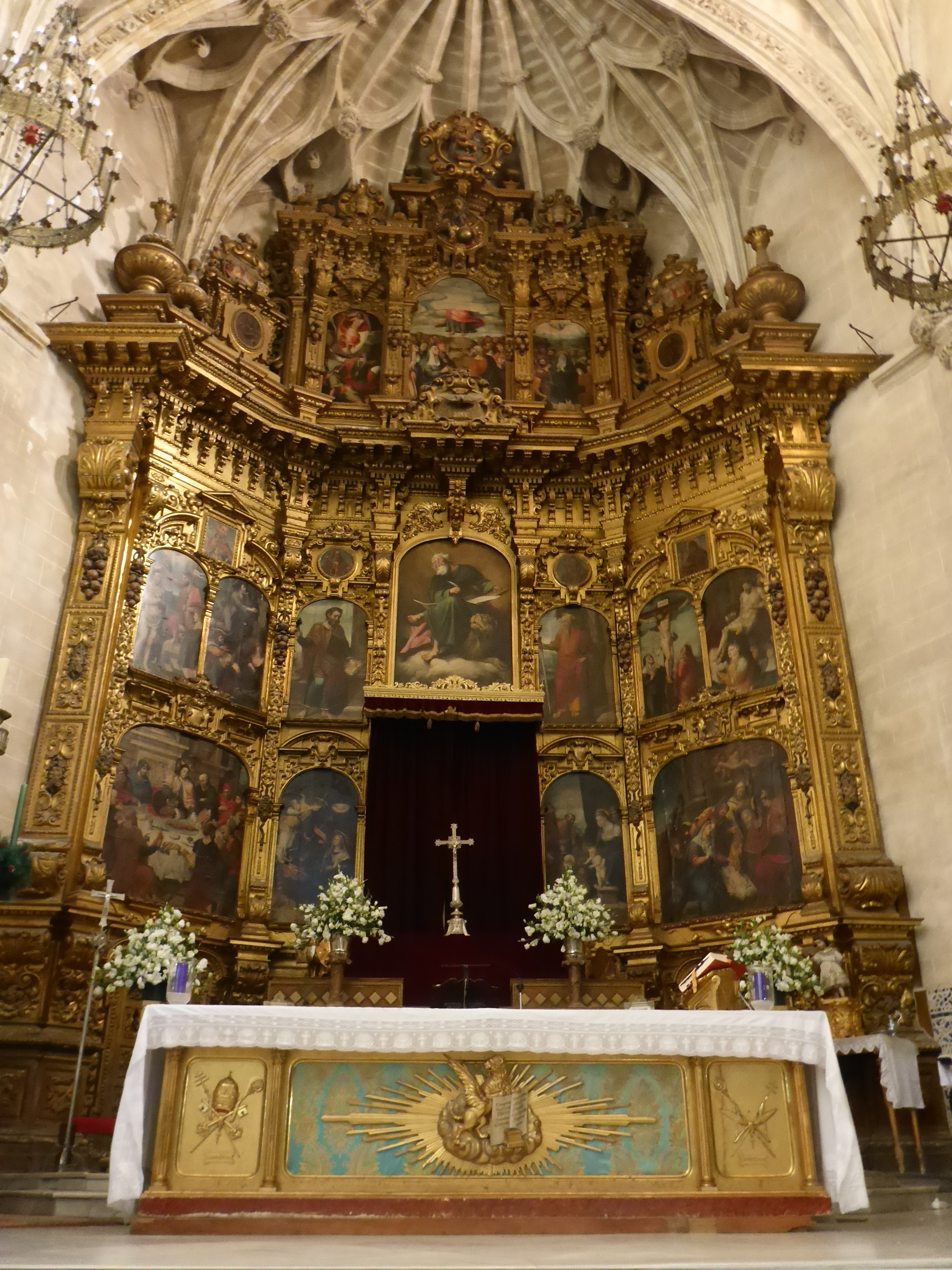 Iglesia de San Marcos en Jerez de la Frontera (España)